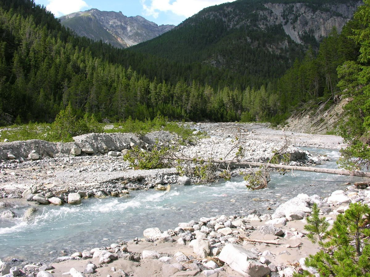 Switzerland, Graubünden, Swiss National Park